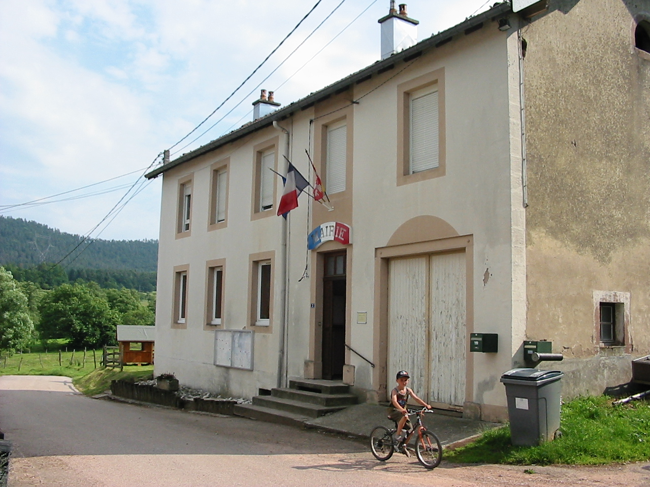 Belmont-sur-Buttant (88) : la mairie.